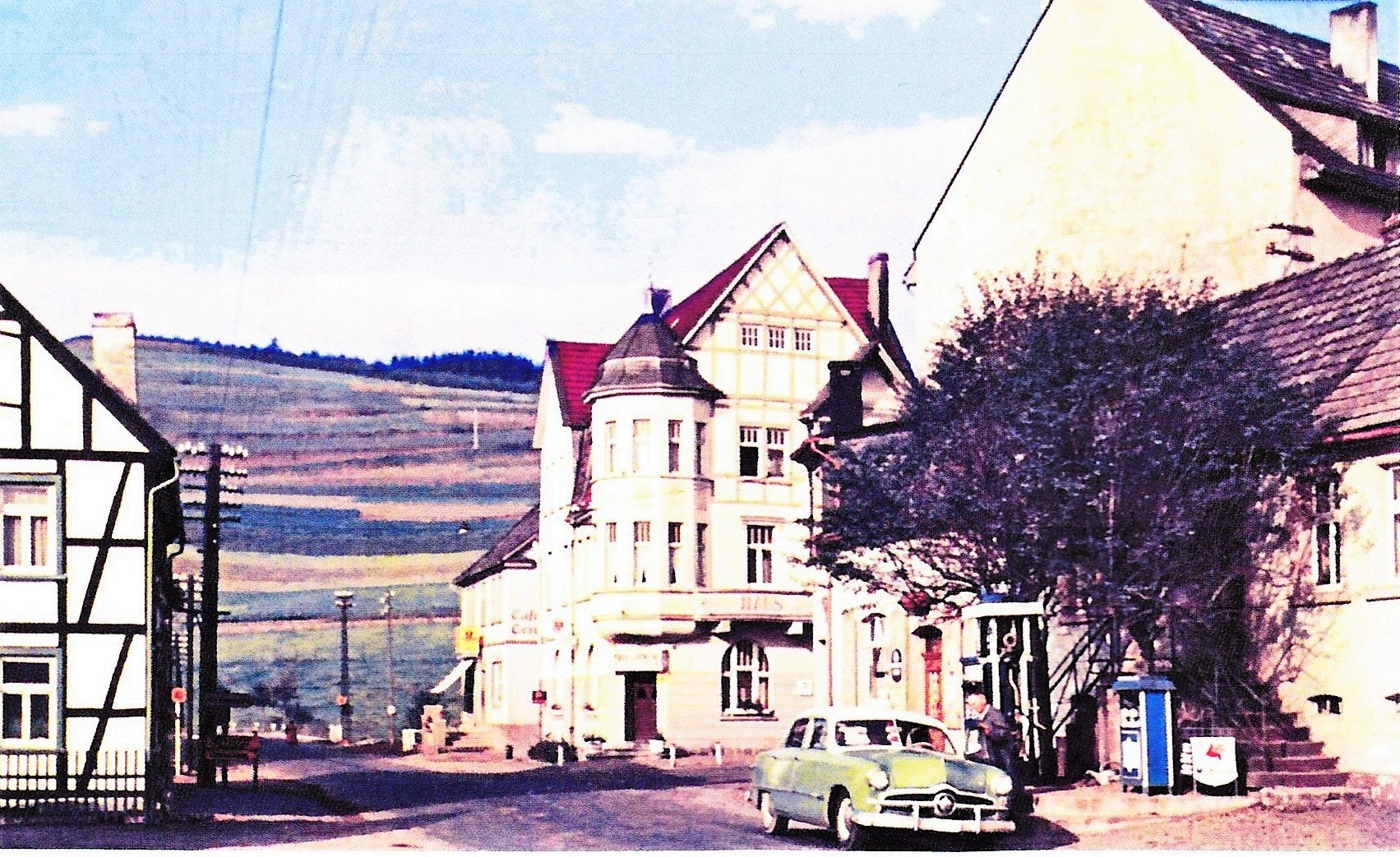 Der ehemalige Attendorner Ortsteil Listernohl, der dem Bau der Biggetalsperre (1956–1965) weichen musste. Postkartenfoto um 1960. Text: „Die erste Erwähnung des Ortes stammt aus dem Jahre 1256. Der Haupthof war ein Lehen des Erzbischofs von Köln. Bis etwa 1500 wurden alle Höfe zu dem Gut des Klosters Ewig zusammengefasst. Nach der Säkularisierung wurde das Gut privatisiert. 1875 erhielt Listennohl einen eigenen Bahnhof. Am 28. August 1897 wurde die erste Kapelle eingeweiht, Grundstein zu der durch Domkapitular Alexander Schnütgen gestifteten Kirche und der 1919 errichteten Pfarrei.“ (Foto: Pastor Wilfried Müller) – Auf der Karte in der Mitte sieht man das Hotel „Haus Listernohl“ und rechts an der Tankstelle wird gerade ein Straßenkreuzer betankt.